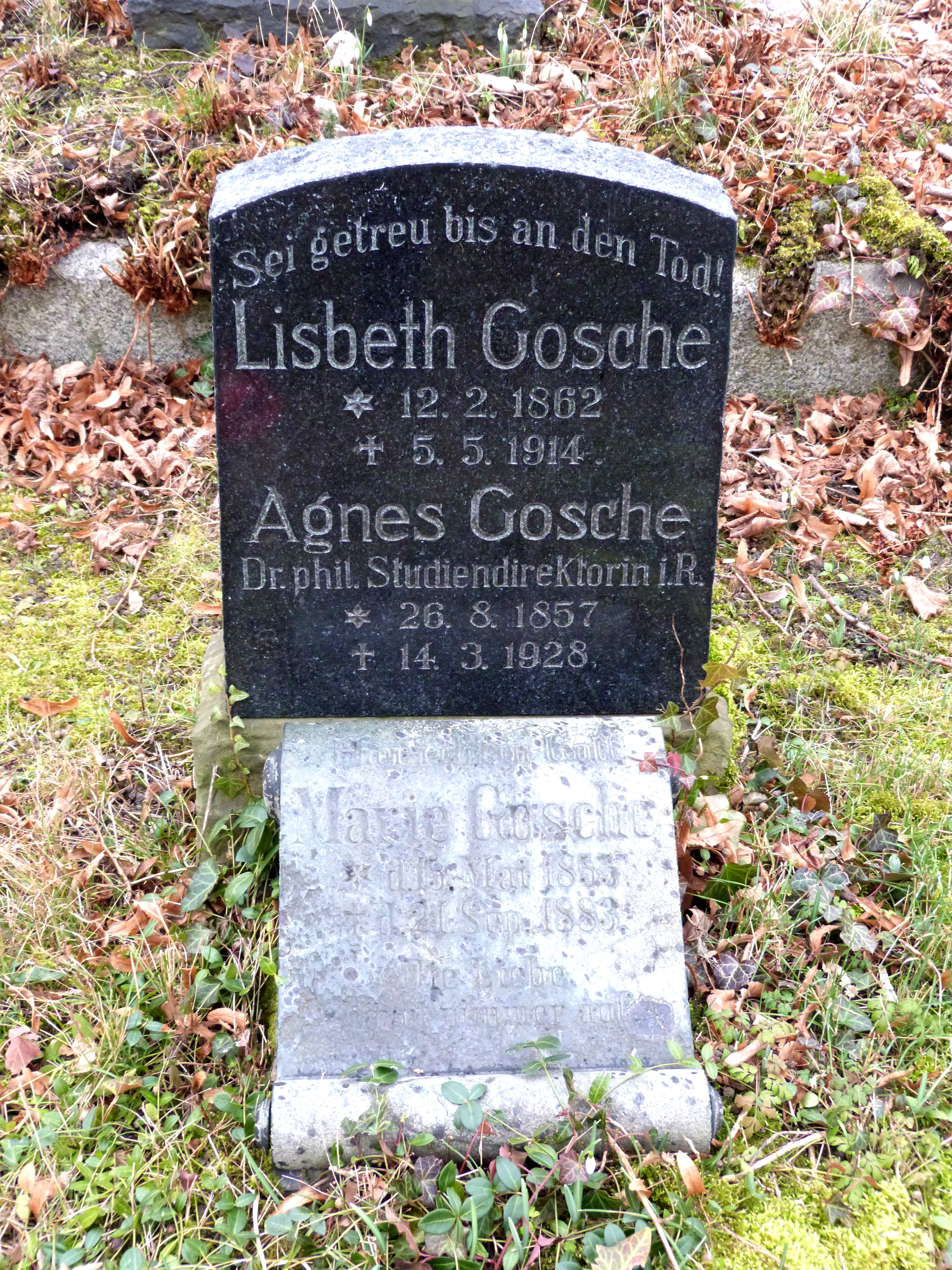 Grab von Agnes Gosche, Stadtgottesacker Halle, Innenfeld Abt. III